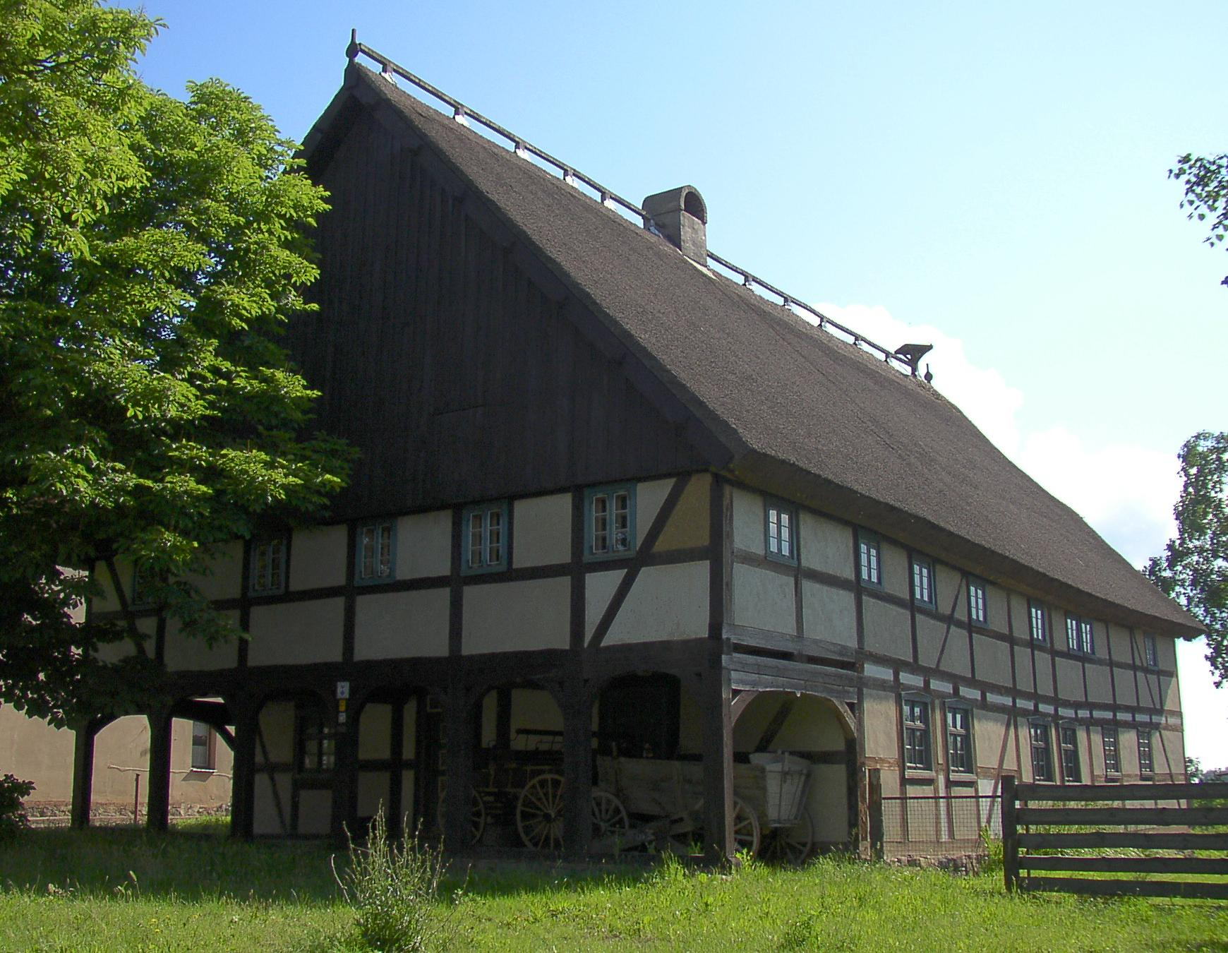 Vorlaubenhaus in Parsteinsee-Lüdersdorf in Brandenburg, Deutschland (Dat Loewinghus = das Laubenhaus, um 1816 erbaut, Dorfstr. 25, Restaurierung gefördert durch die Dt. Stift. Denkmalschutz)